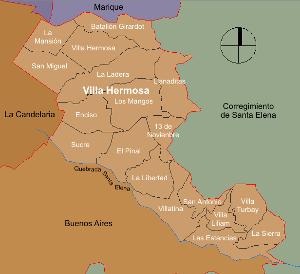 mapa de la división barrial de la comuna Villa Hermosa. Medellín, Colombia.